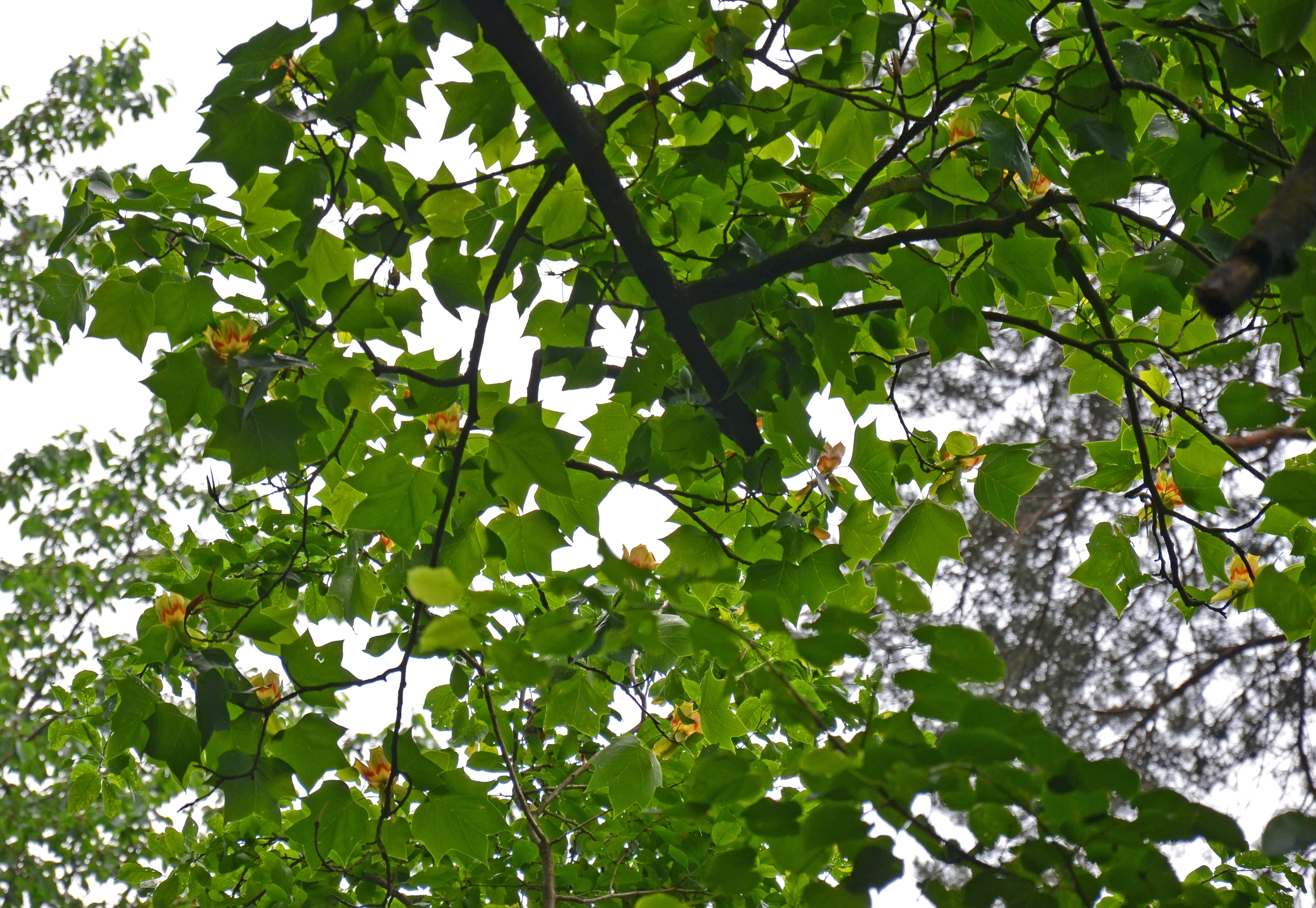 «Тюльпанове дерево», Ірпінь, Ворзельська селищна рада